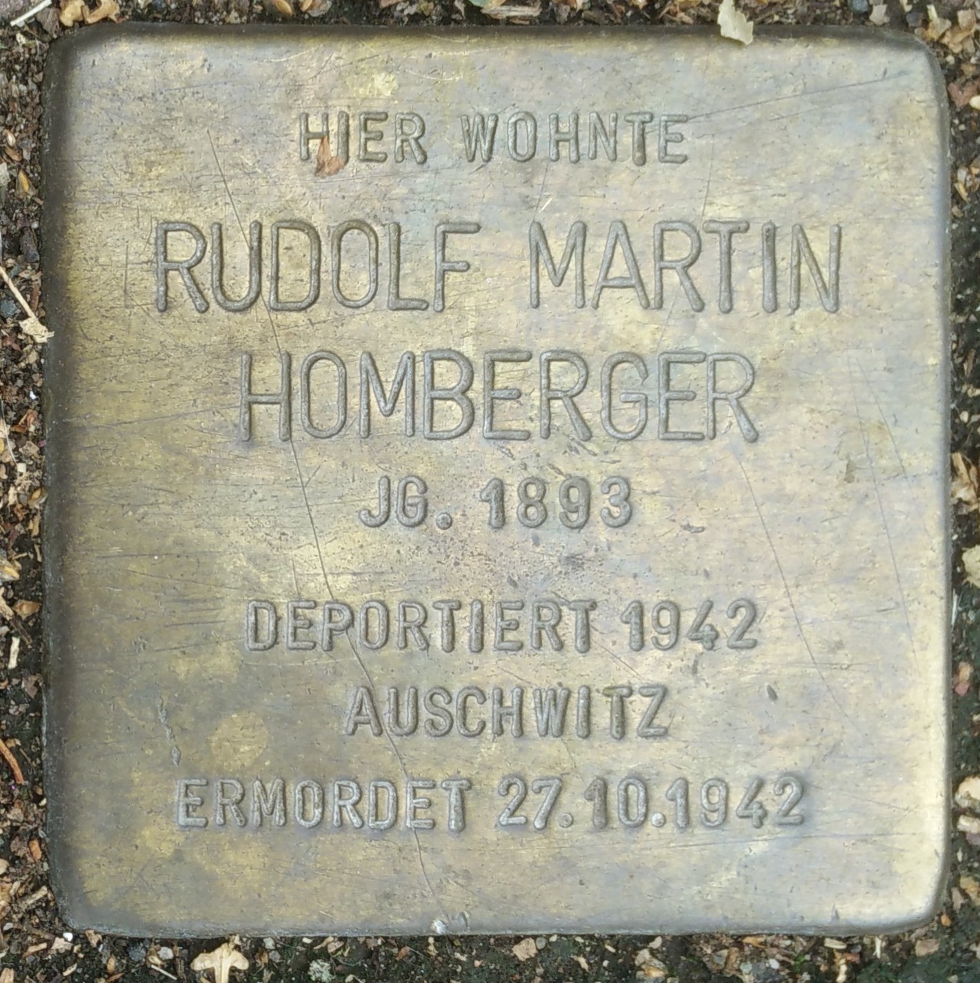 Bad Vilbel, Stolperstein Rudolf Martin Homberger